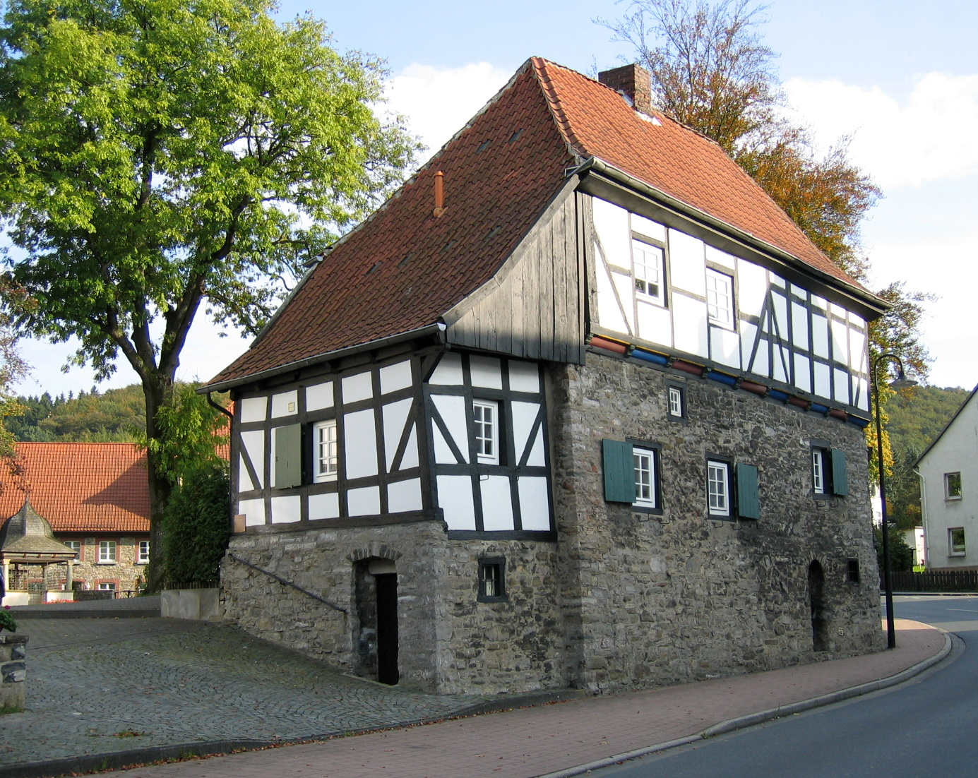 Description: Alte Vikarie St. Nikolai (1627), heute Wohnhaus, Balve Source: selbst fotografiert Date: 9. Okt. 2005 Author: Bubo